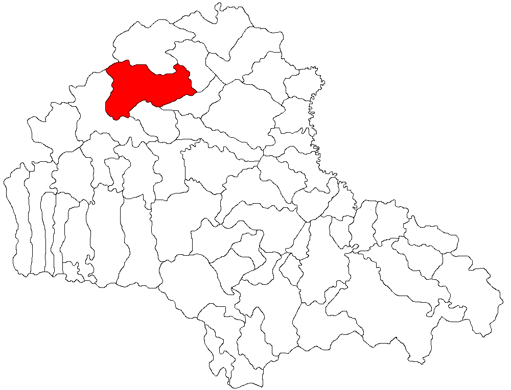 Categorie:Hărţi ale judeţului Braşov